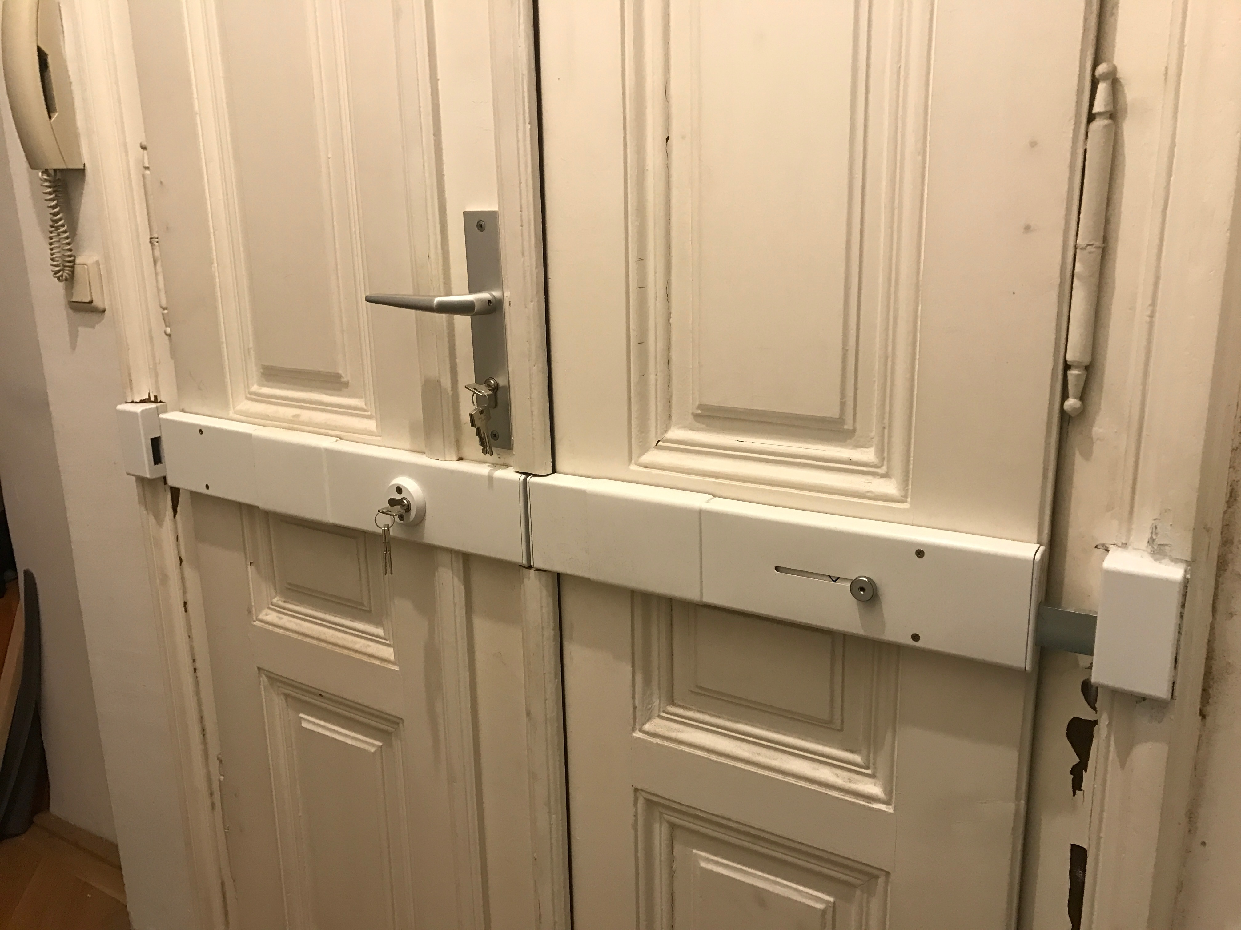 Ein gut montiertes Balkenschloss